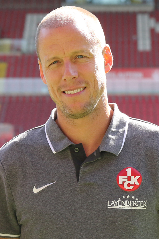 Kevin McKenna (Co-Trainer des 1. FC Kaiserslautern)